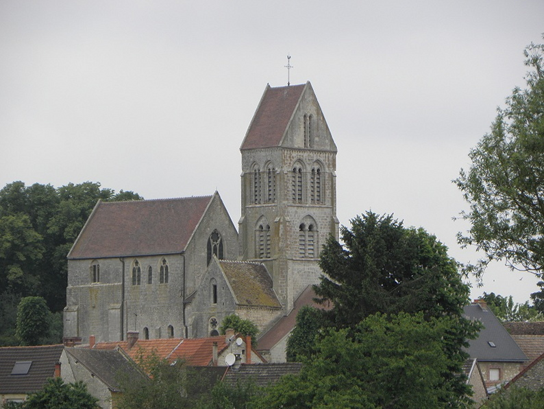 Vue méridionale de l'église Saint-Julien de Courville (51).